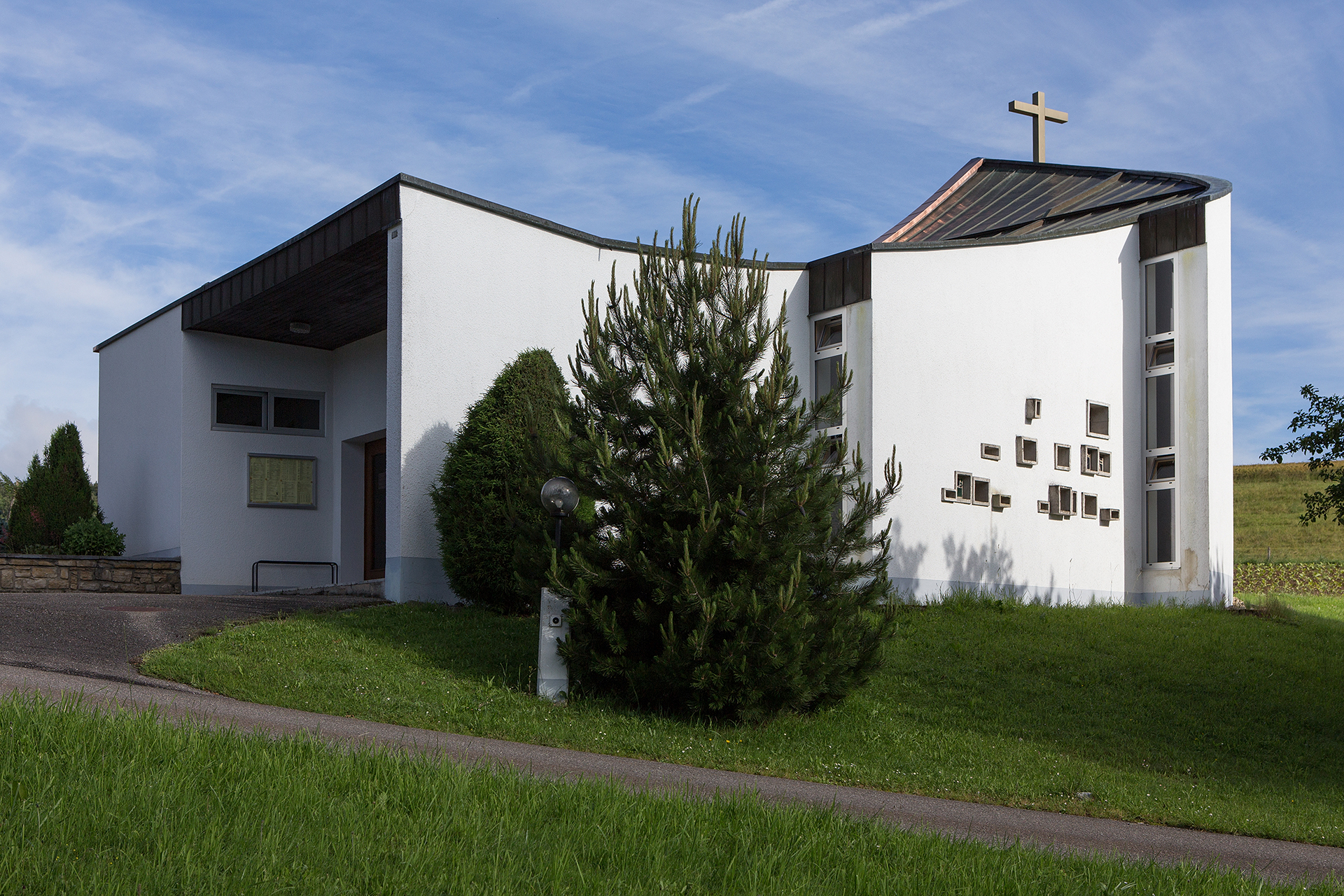 Kapelle Saint-Nicolas de Flüe in Mormont, Courchavon (JU)